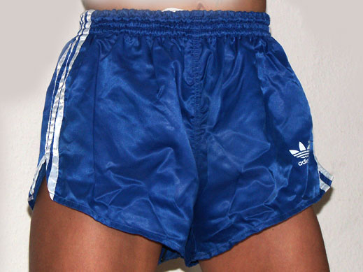 Turnhose aus Nylon Modell adidas "Franz Beckenbauer". Die Turnhose wurde in den 70er und 80er Jahren produziert und wurden damals viel getragen. Fotografiert von shortszene am 13.08.2006